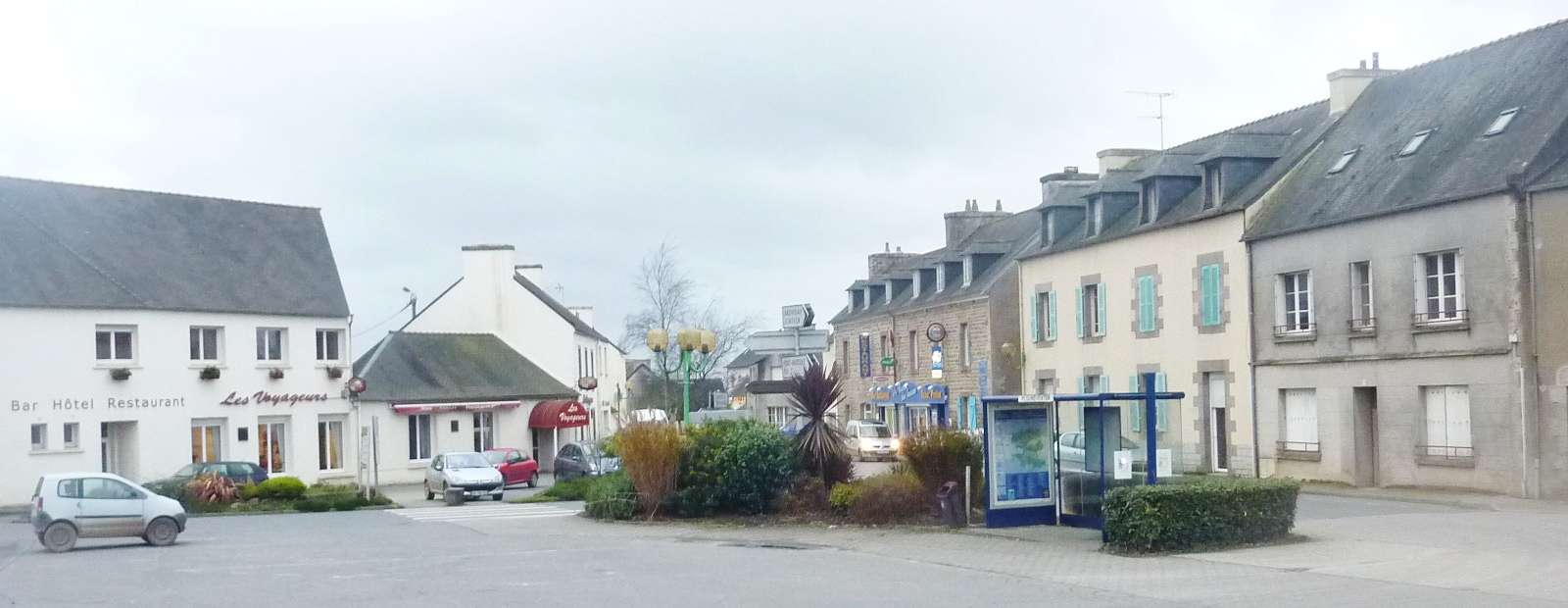 Plounéventer : la place principale devant l'église paroissiale